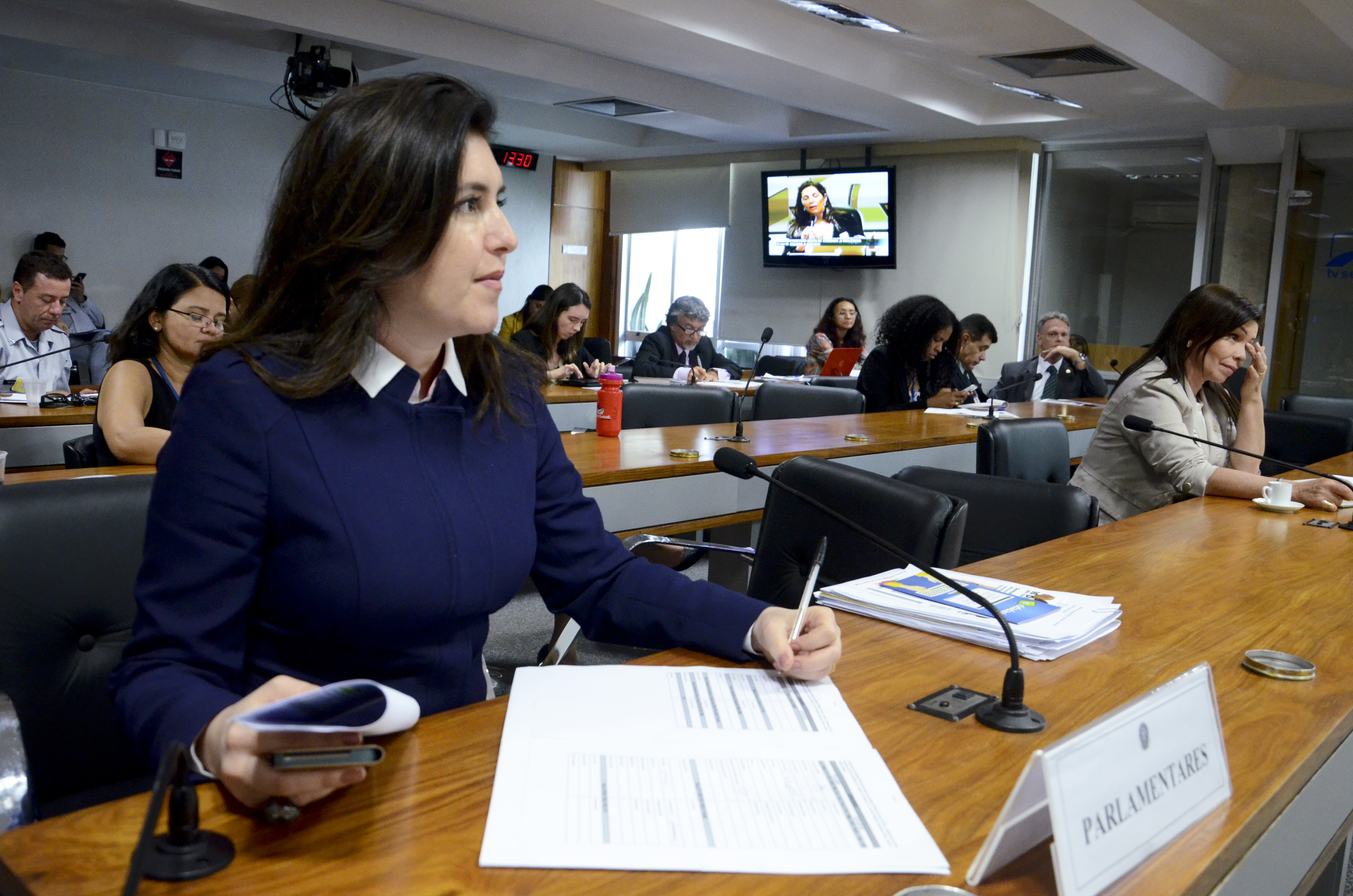 Comissão Permanente Mista de Combate à Violência contra a Mulher (CMCVM) realiza audiência pública para debater experiências importantes na efetivação de medidas protetivas, utilizadas com o objetivo de reduzir os altos índices de violência contra a mulher, a exemplo do "Botão do Pânico, Tornozeleira Eletrônica e Casas-Abrigo". À bancada, senadora Simone Tebet (PMDB-MS). Foto: Ana Volpe/Agência Senado